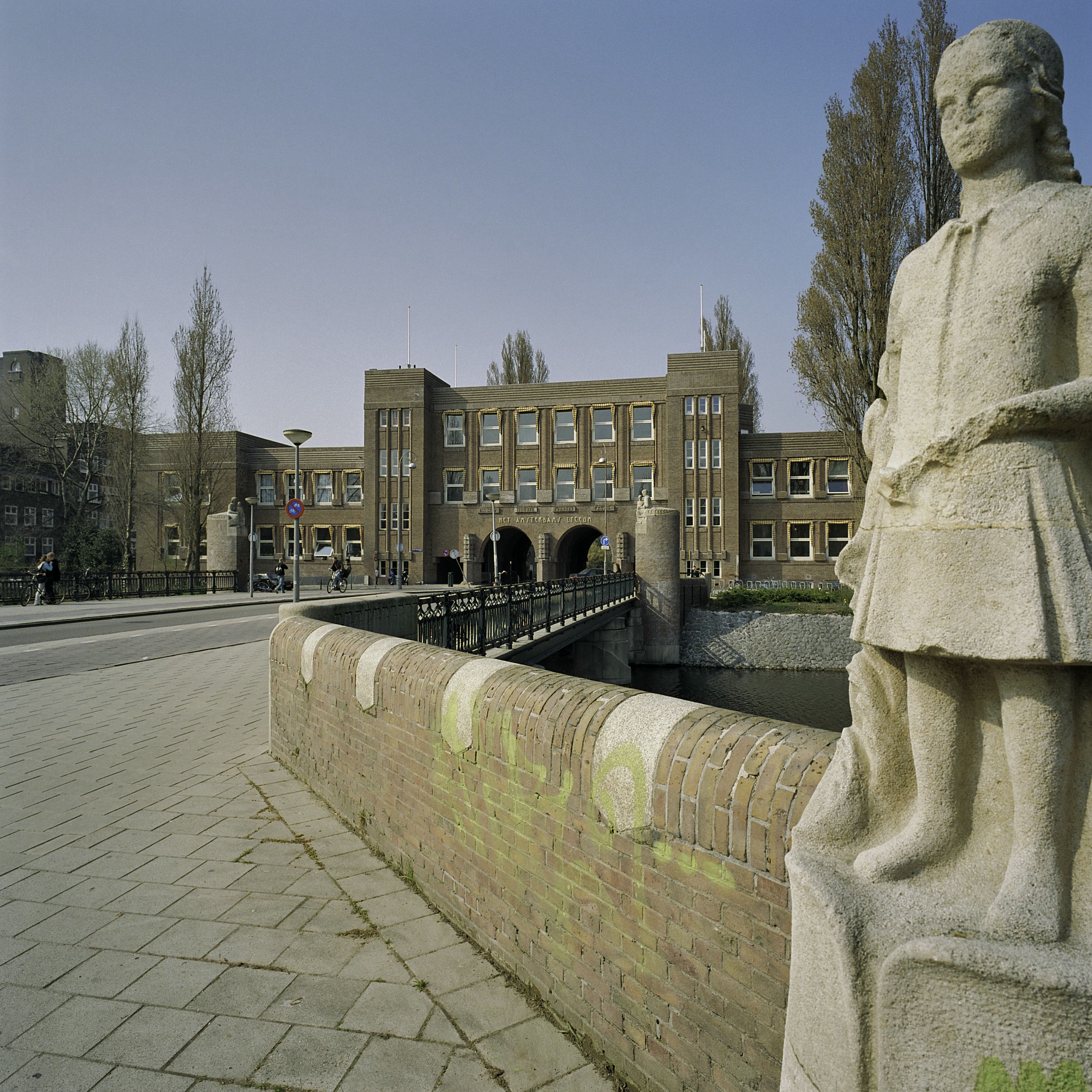 Het Amsterdams Lyceum: Overzicht op het lyceum gezien vanaf Olympiaplein (opmerking: Gefotografeerd voor Monumenten In Nederland Noord-Holland)